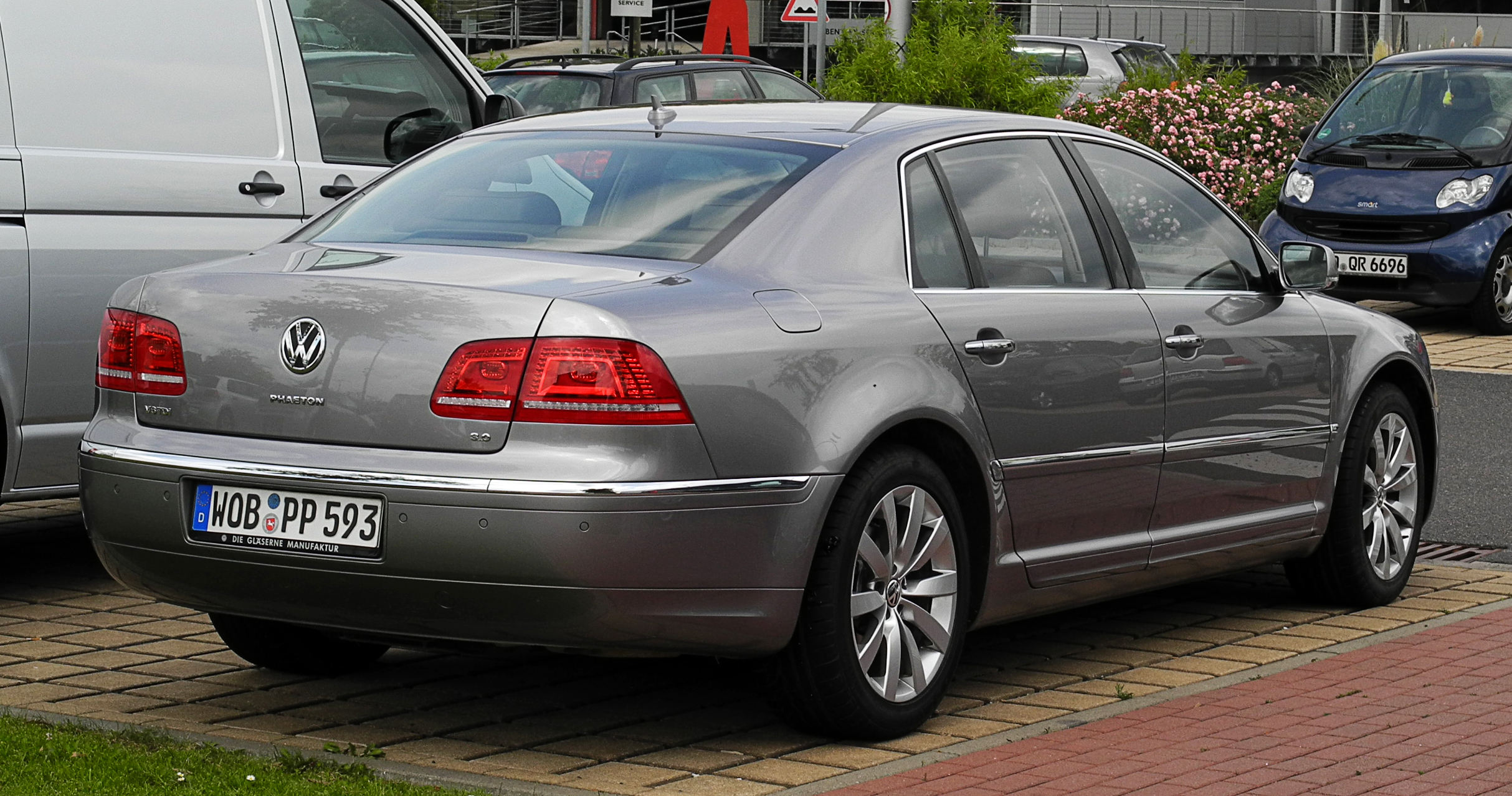 VW Phaeton 3.0 V6 TDI 4MOTION (2. Facelift)